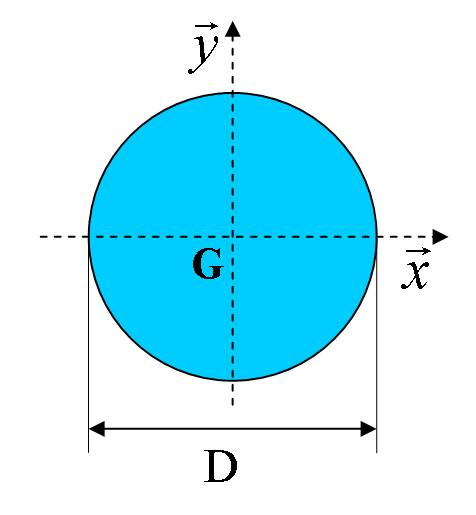 Section ronde: schéma pour formules de moment quadratique. Auteur: Xavier Lory.